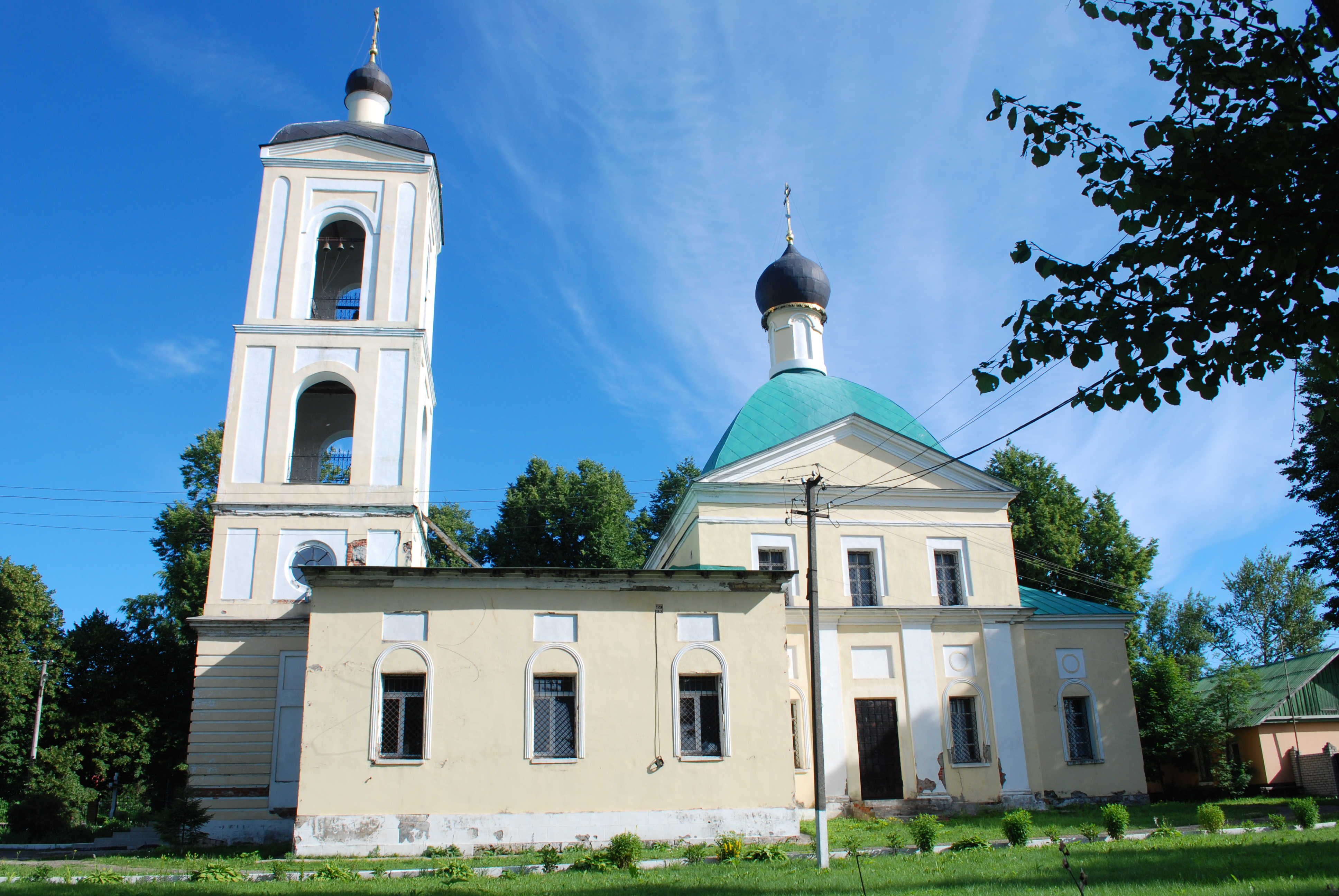 Церковь Преображения Господня (Москва и Московская область, Кубинка, село Крымское)